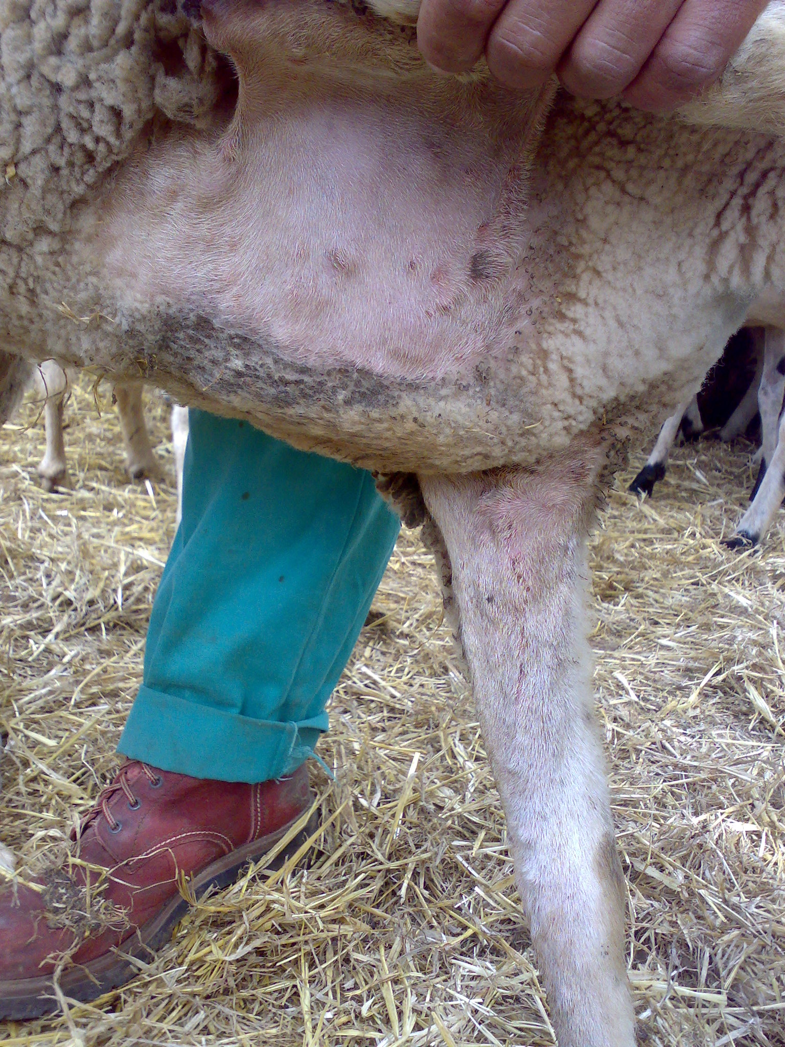 Walon: Noerès plokes ås bedots : plokes e l' axhele (crapes)